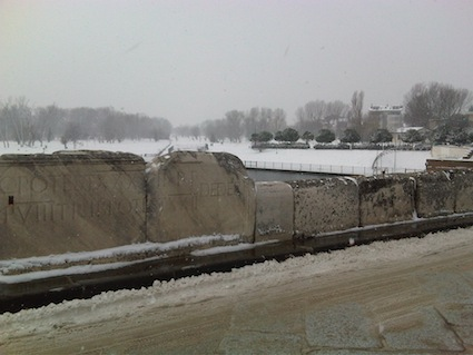 Ponte di Tiberio - MIBAC This is a photo of a monument which is part of cultural heritage of Italy.